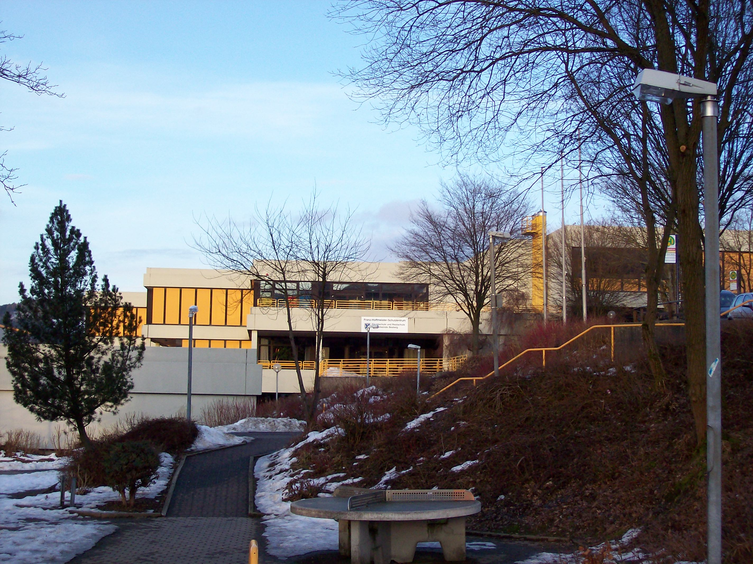 Bestwig, Schulzentrum (Germany)